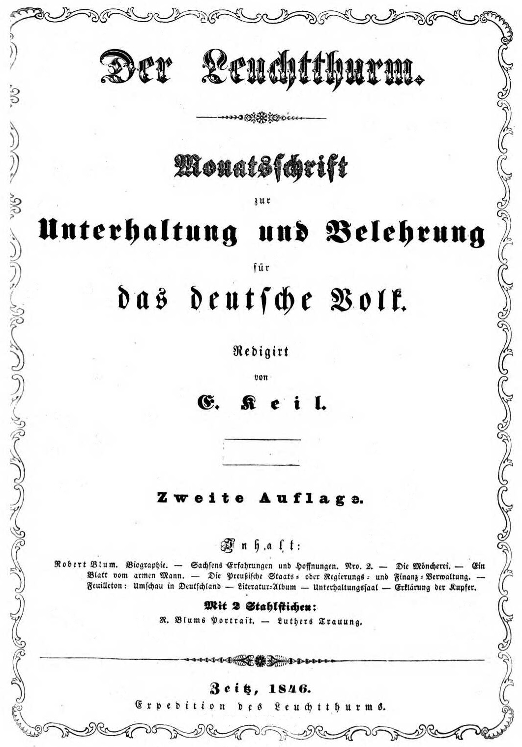 Erstausgabe der Zeitschrift "Der Leuchtturm"